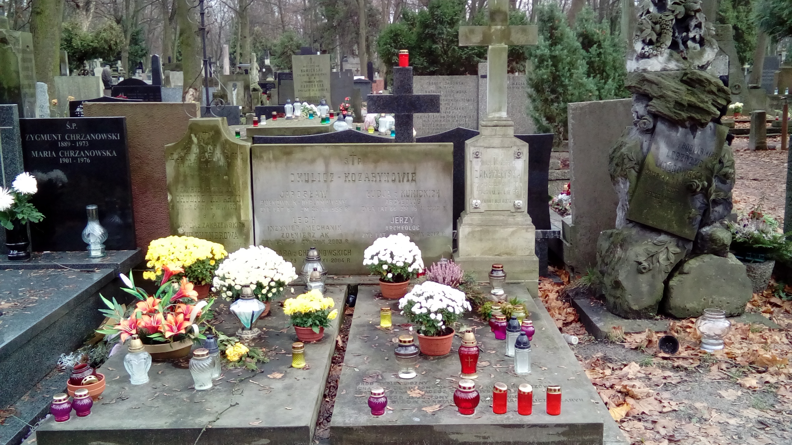 Grób Jerzego Okulicz- Kozaryna na Cmentarzu Powązkowskim